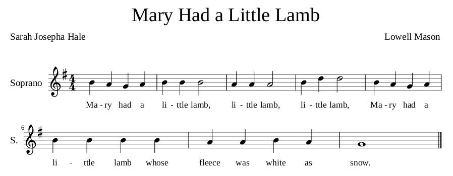 Partitura de la canción con la primera estrofa